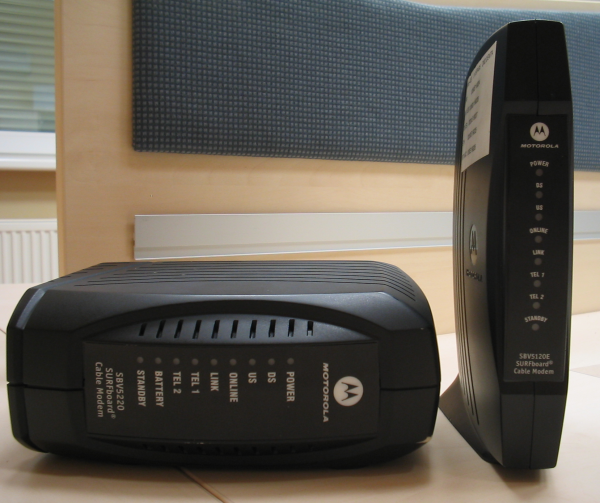 Modemy kablowe VoIP stosowane w sieciach kablowych do przesyłania danych (zwykle do realizowania dostępu do Internetu oraz realozowania usługi telefonicznej), dwie wersje - klasyczny oraz z podtrzymaniem zasilania (leżący).